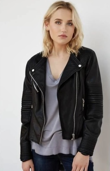 ז'קט טבעוני